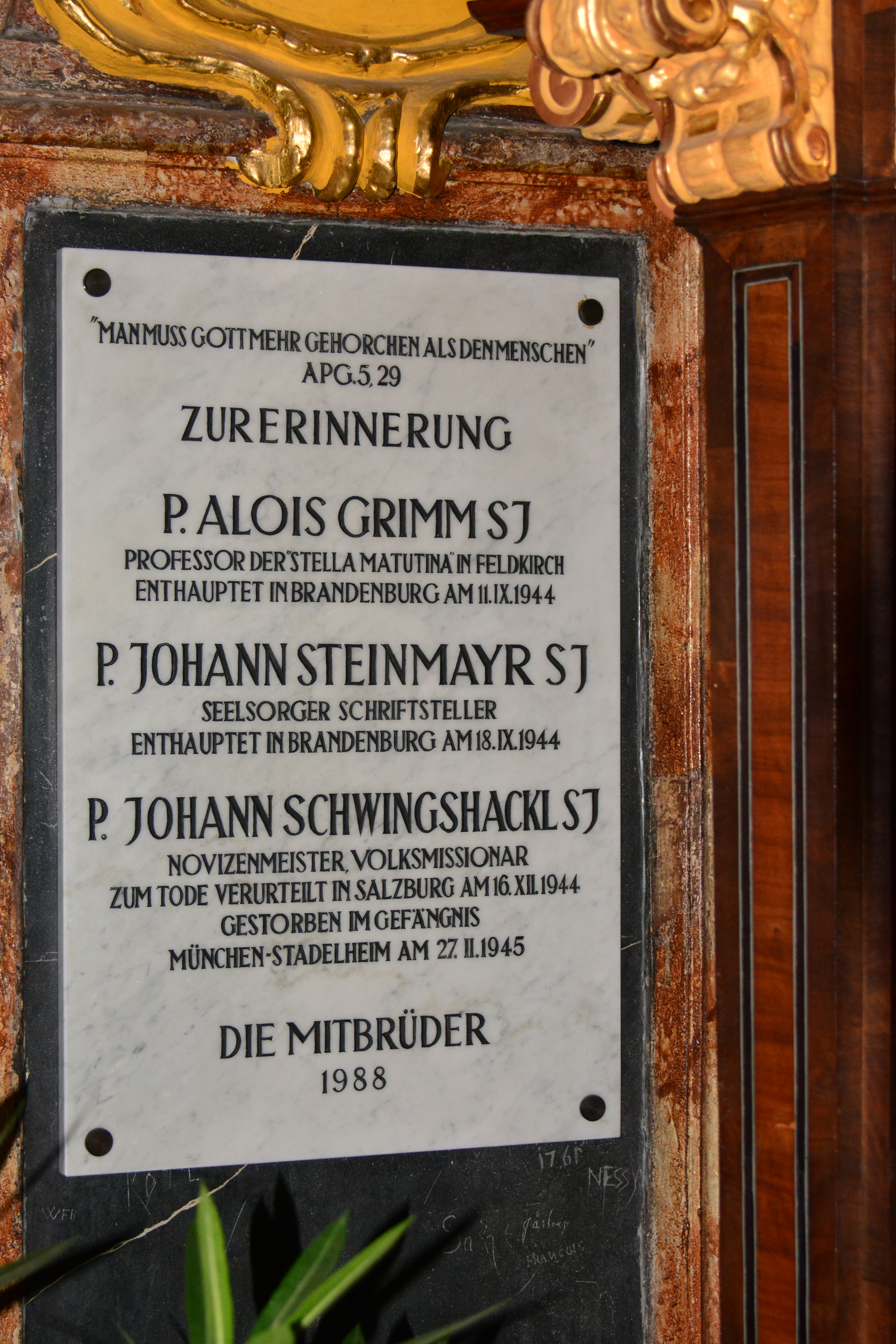 Gedenktafel für NS-Opfer (Wien, Dr.-Ignaz-Seipel-Platz, Kirche)